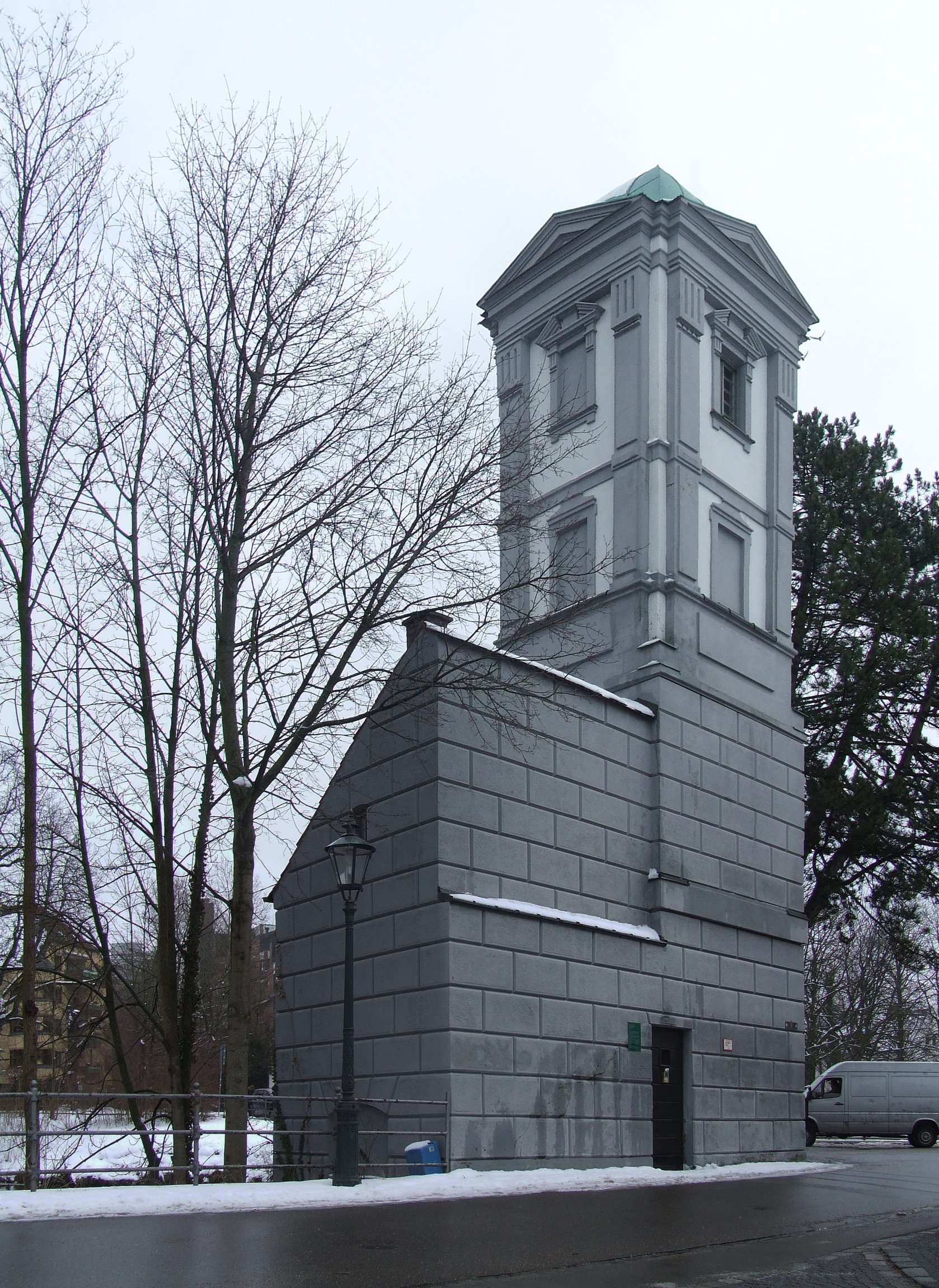 Augsburg, Gänsbühl, unterer St.-Jakobs-Wasserturm.